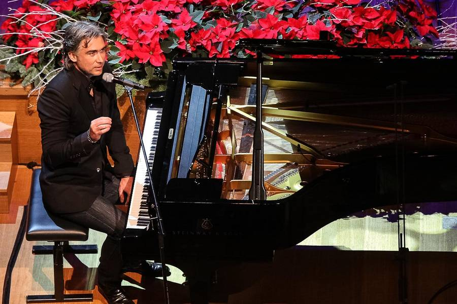 Dobrodelni koncert Vojaki za lažje otroške korake v Gallusovi dvorani Cankarjevega doma